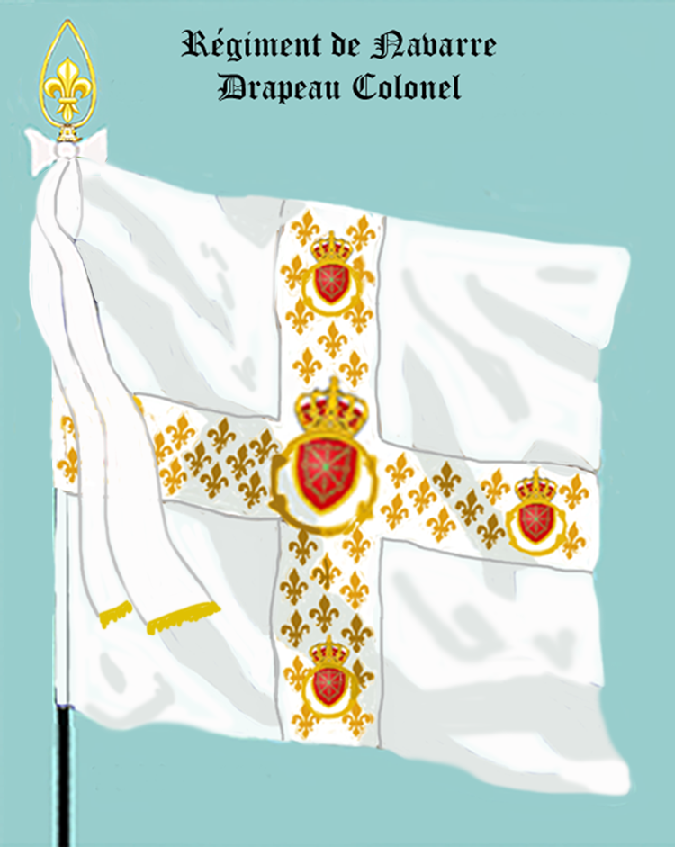 Leibfahne bei der 1. Kompanie des königlich französischen Infanterie-Regiments „de Navarre“. - Entnommen und überarbeitet aus: „LES UNIFORMES ET LES DRAPEAUX DE L'ARMÉE DU ROI“ Marseille 1899. (Drapeau Colonel de 1er compagnie du régiment française d'infanterie royale „de Navarre“.)